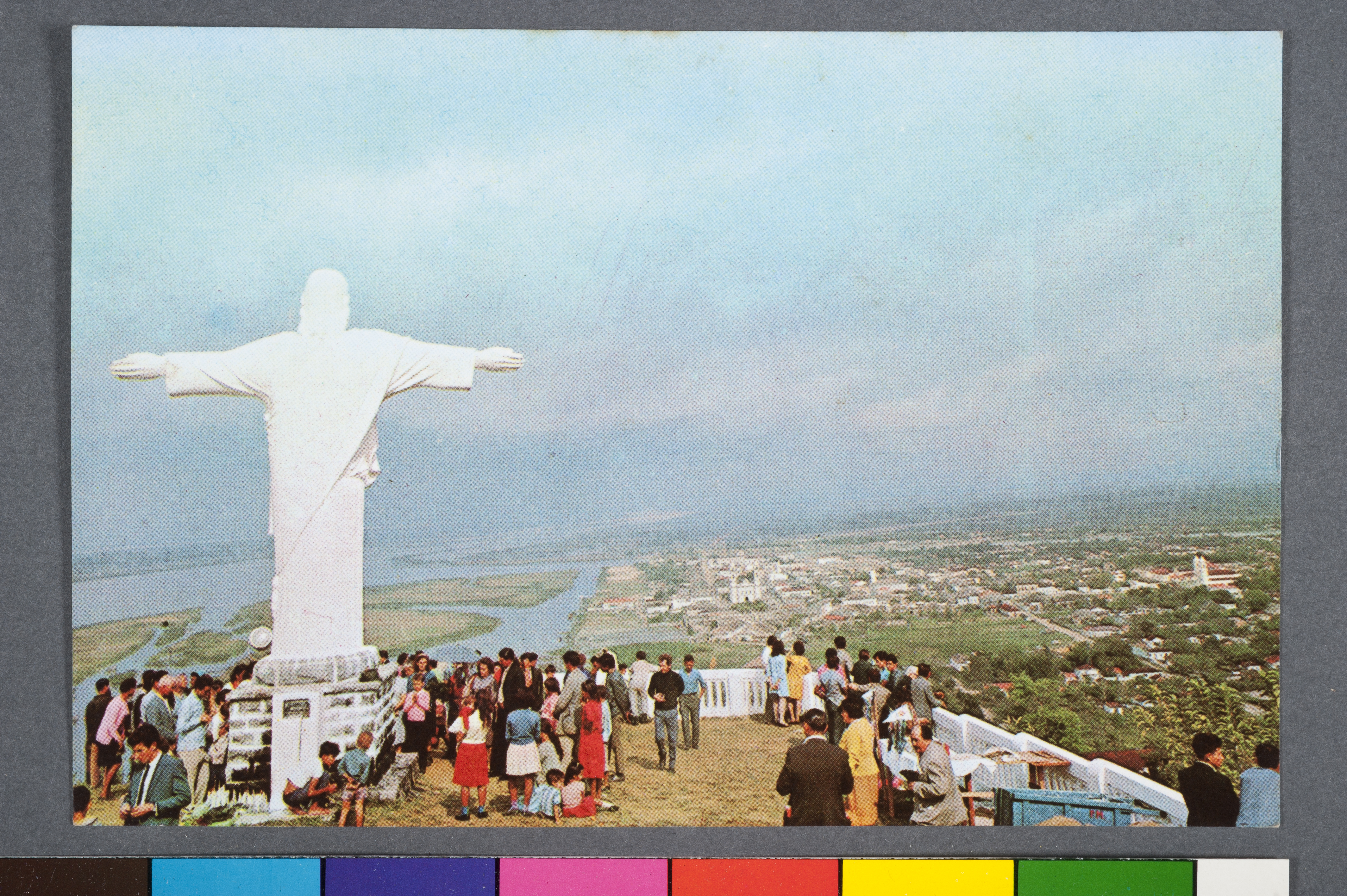 Obra que integra o acervo do Museu Paulista da USP. Coleção João Baptista de Campos Aguirra. Ref. Agente: Folhinhas Scheliga S. A.